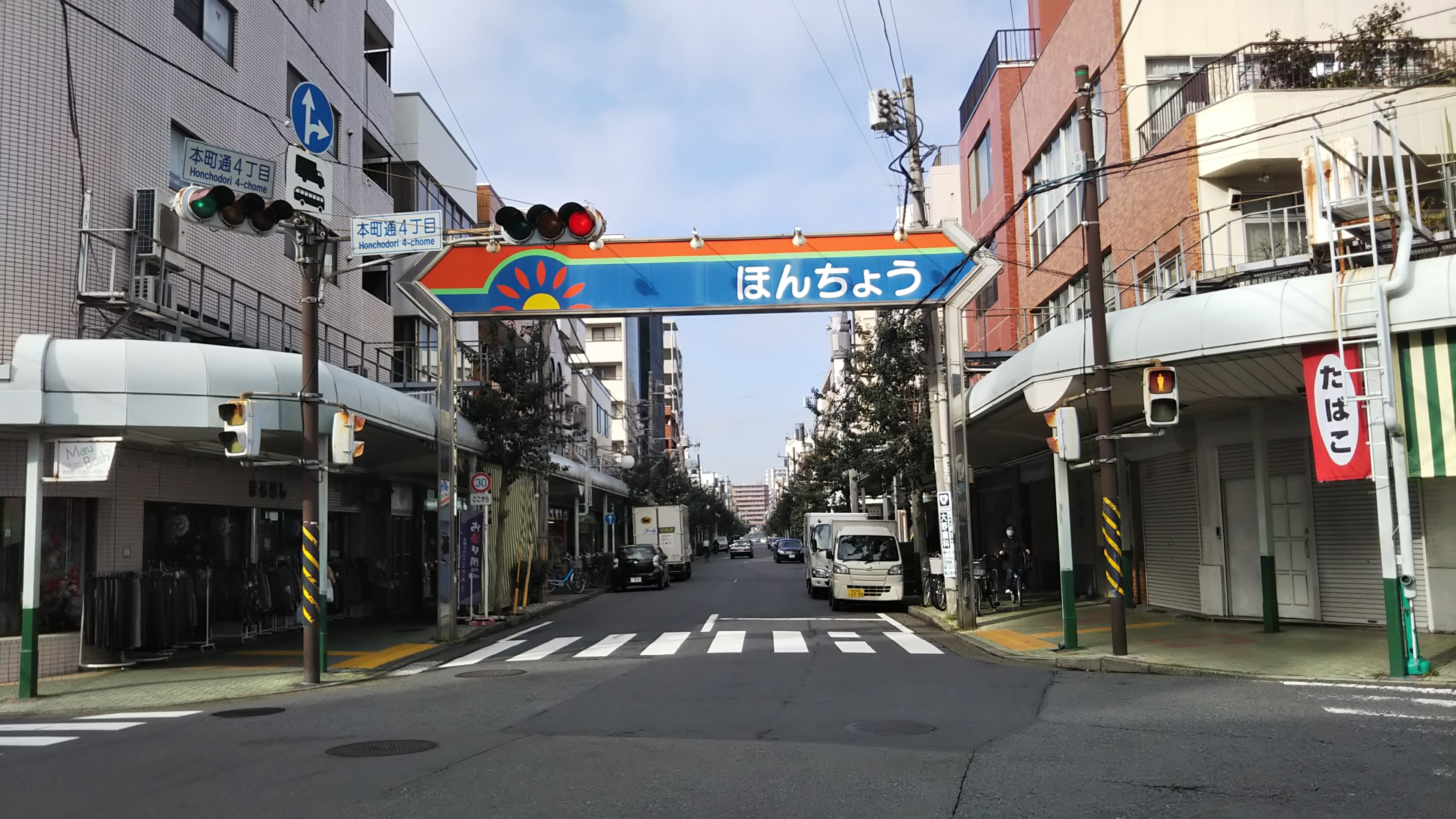 横浜市鶴見区、本町通商店街